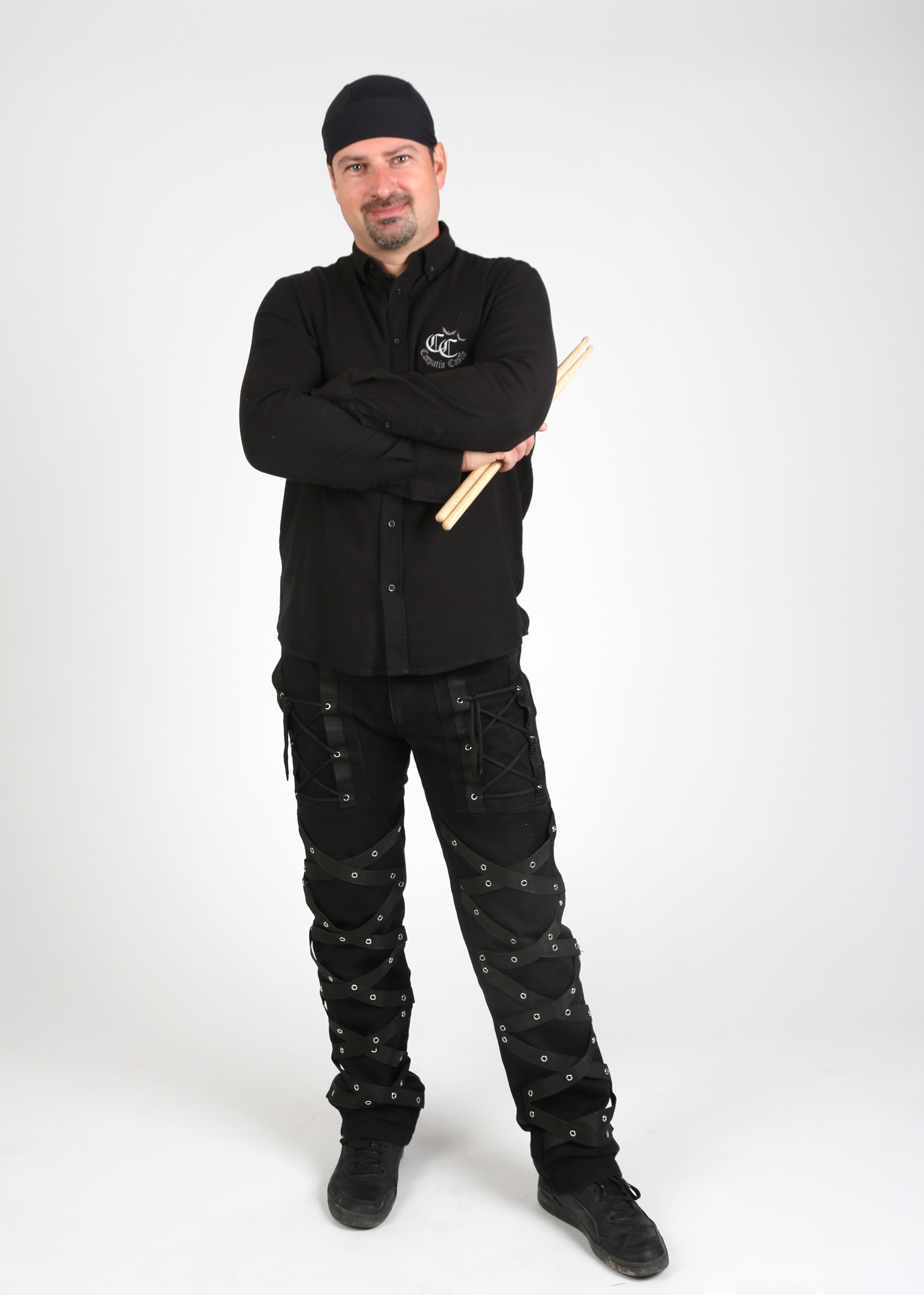 Zdeněk CC